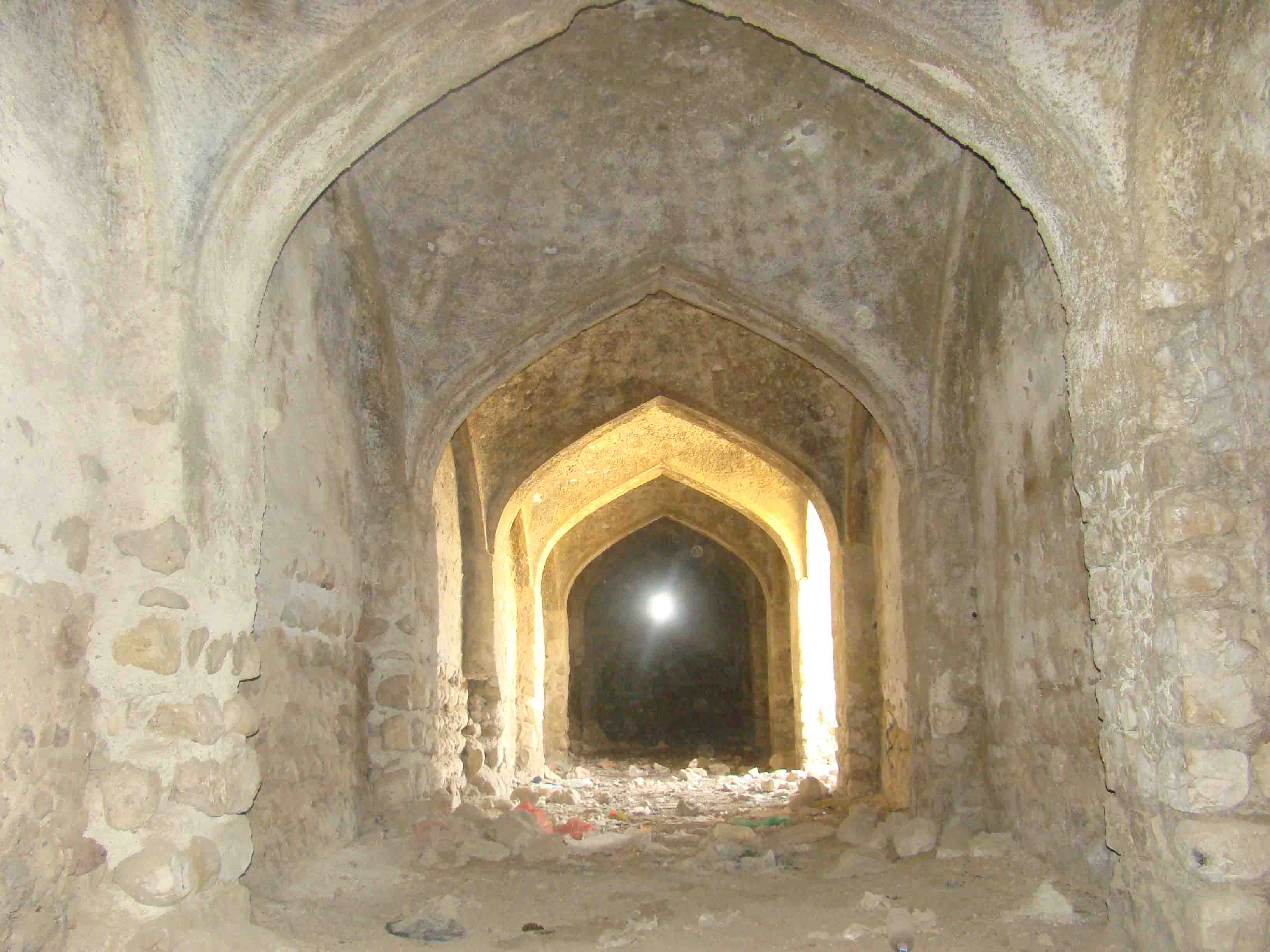 کاروانسراي شترخانه جويم